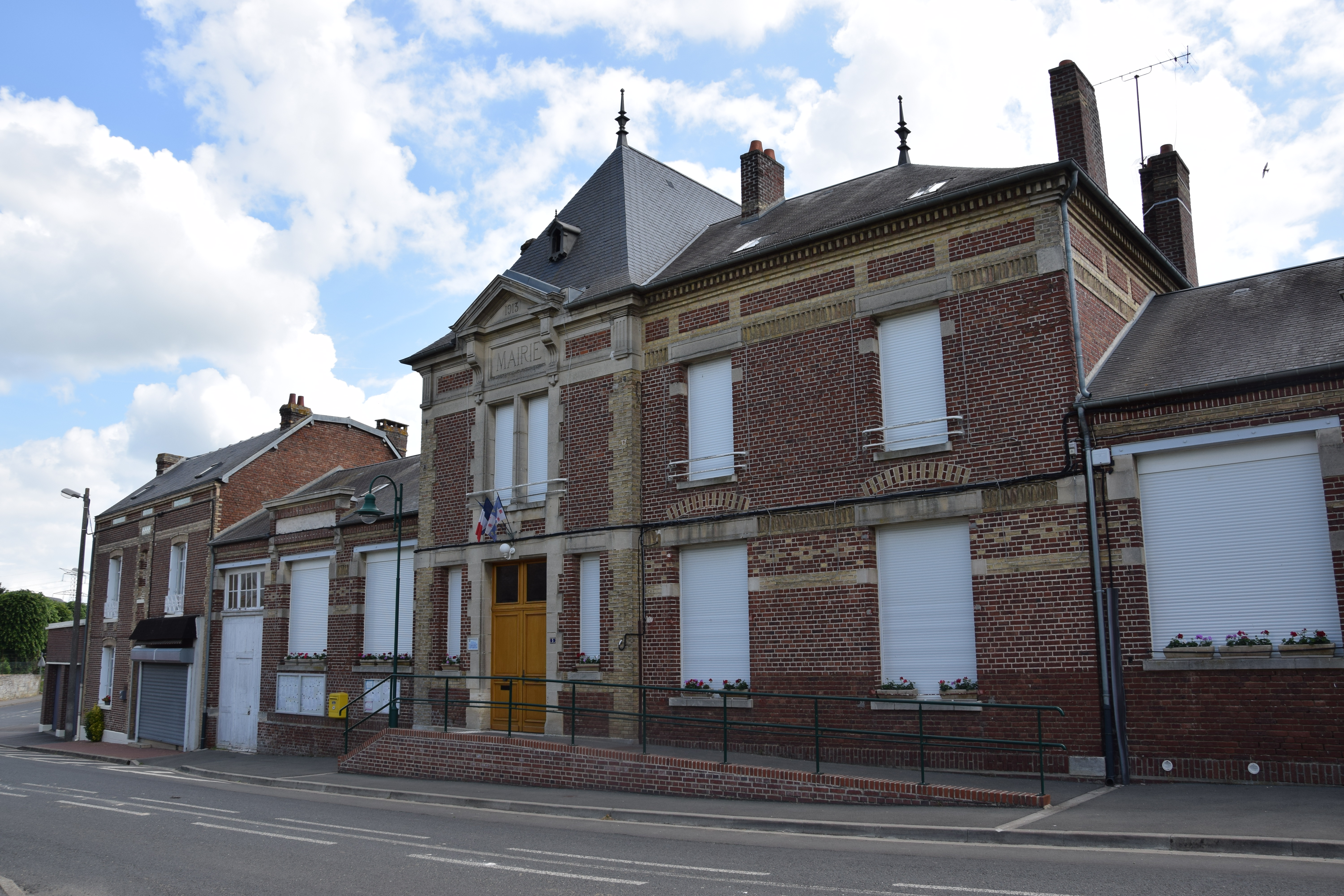 Hardivillers